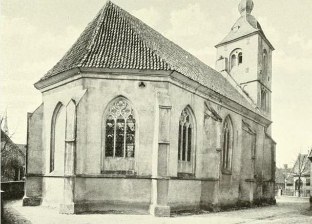 Alt St. Ludgerus